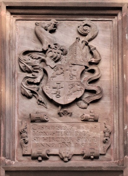 Wappentafel aus Sandstein; zeigt das Wappen von Caspar II. Thoma Abt des Kloster St. Blasien 1571–1596. Die Tafel befand sich bis 1900 an der Klostermühle des Klosters Weitenau und ist seither am Brombacher Schloss angebracht. Eine in Bronze gegossene Kopie befindet sich am Rathaus des zur Gemeinde Steinen gehörigen Ortsteils Weitenau. Der springende Hirsch ist das Wappen des Klosters St. Blasien. In den beiden anderen Wappenfeldern ist das Familienwappen des Abtes zu finden - eine Hand mit Schlüssel und drei kleinen Kronen. In der Wappenzier ein Löwenkopf mit Krone und eine Mitra mit Abtstab. Beschriftung der Tafel: Casparus.D.G.Abbas Monasterii.D.Blasii Herciniae.Sylvae Anno.1581 Übersetzung: Caspar von Gottes Gnaden Abt des Klosters St. Blasien im Schwarzwald siehe hierzu Rudolf Dietsche: Das ehemalige Wasserschloß zu Brombach - vom Herrensitz zum Rathaus. In: Unser Lörrach, 1988, S. 78